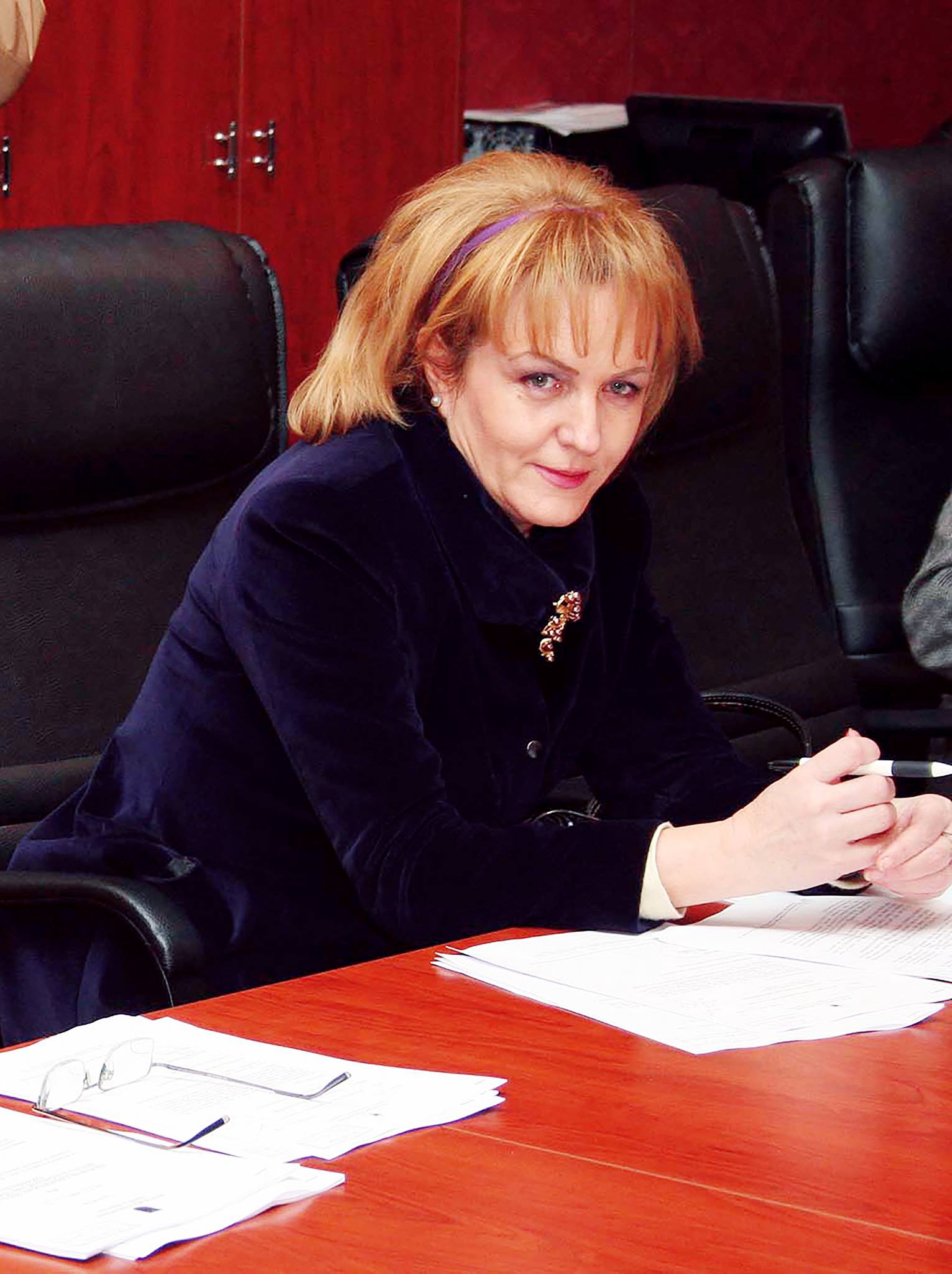 Pernaska ne Komisionin e Jashtem (2011)